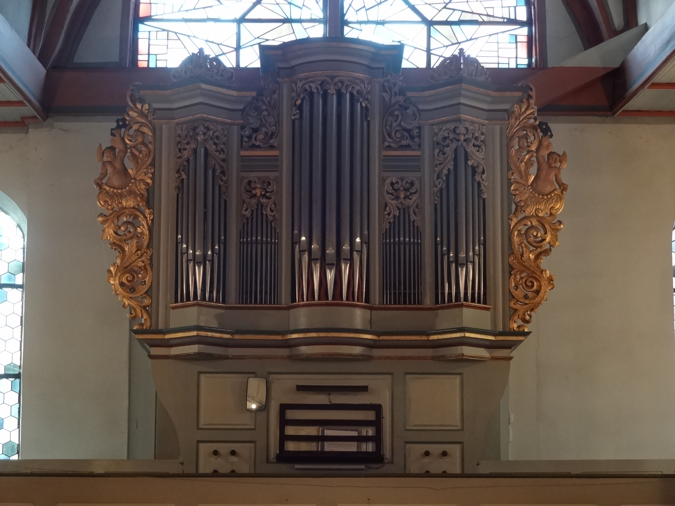 Evangelische Pfarrkirche (Hoch-Weisel)